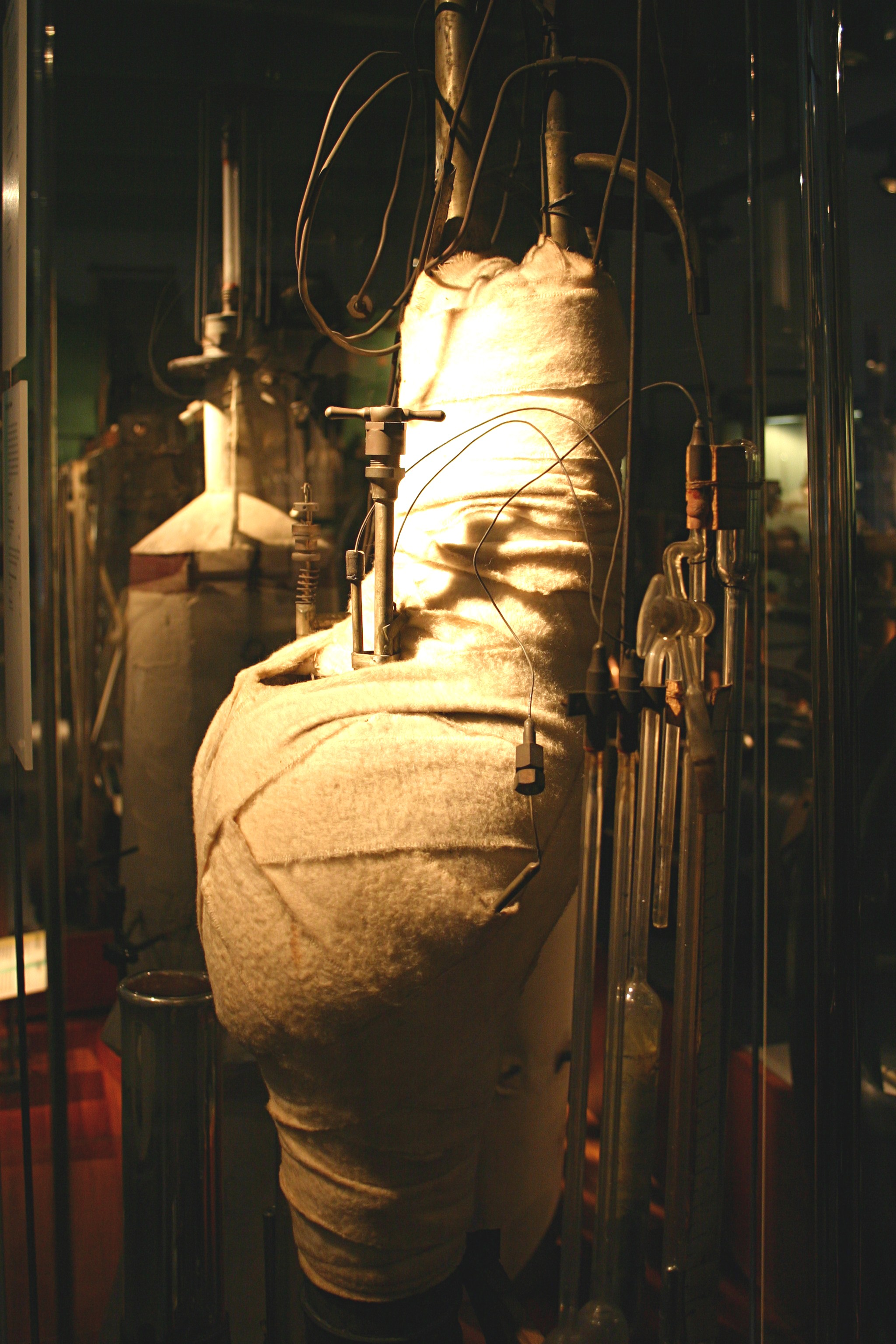 Museum Boerhaave, Leiden - Helium liquefier (detail) dimensions: w 48 cm h: 153 cm d: 27 cm period: 1900